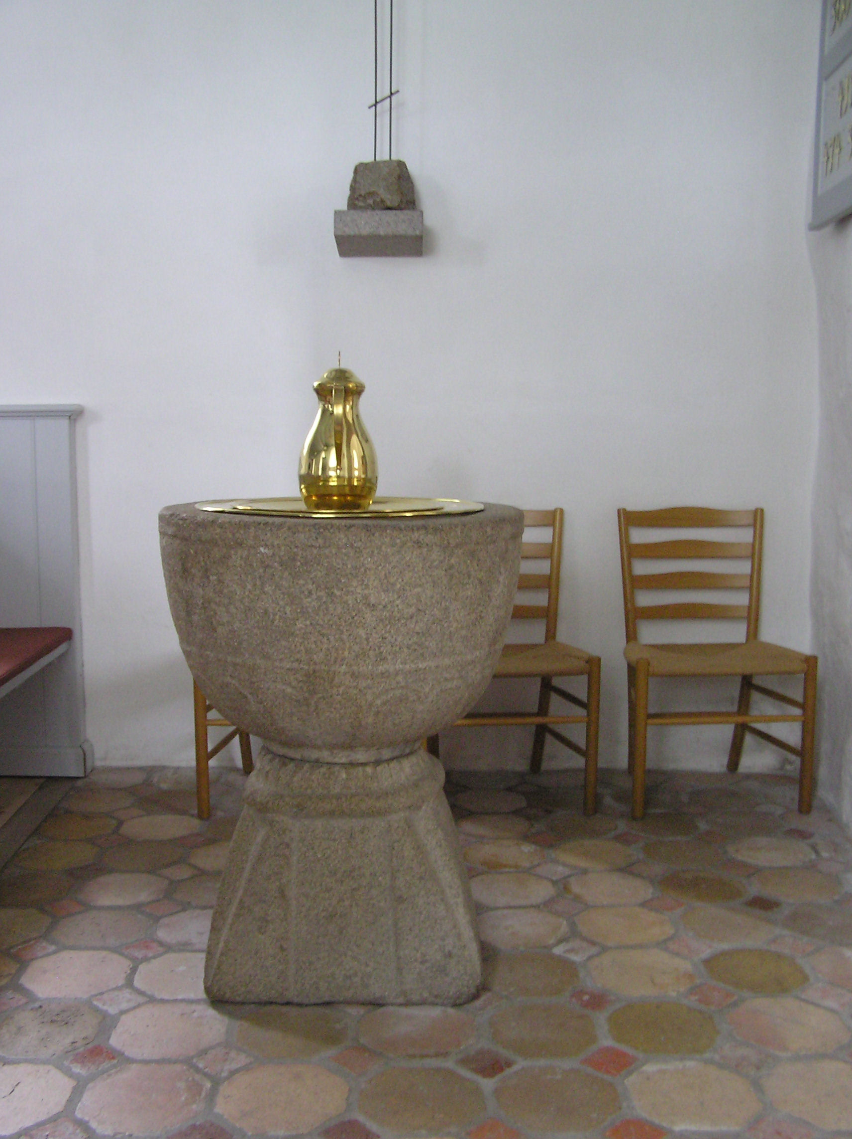 Ulsted Kirke,Aalborg Stift